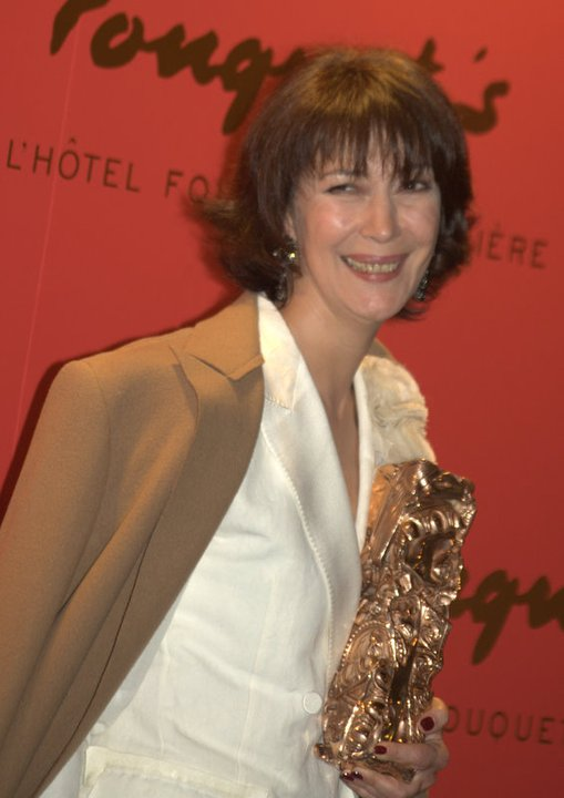 Anne Alvaro à la cérémonie des César